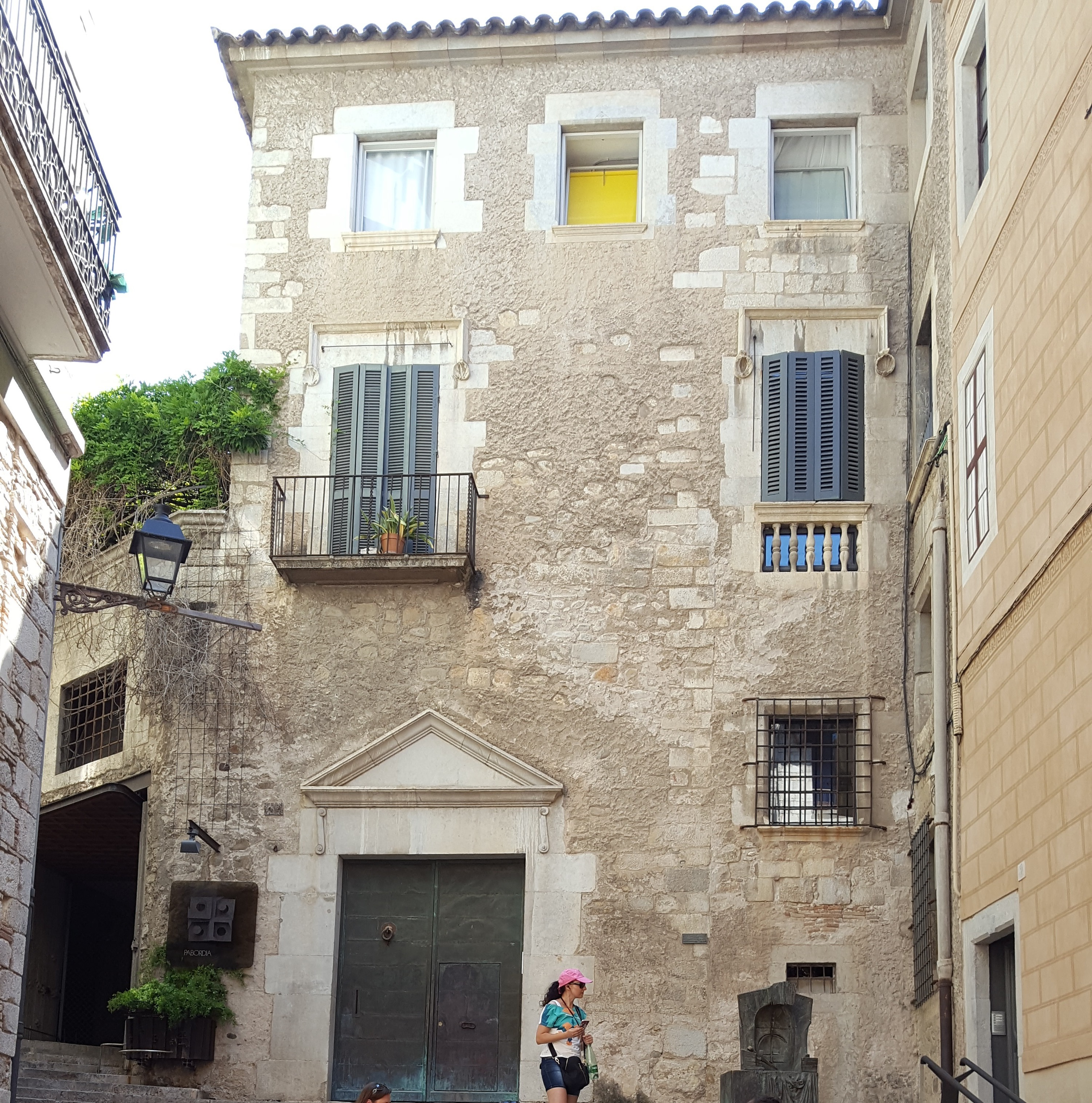 בית רמב"ן